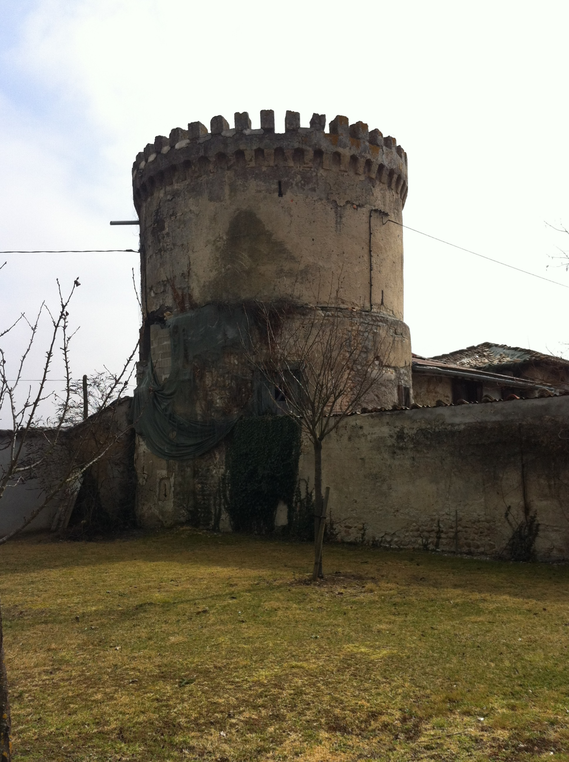 Vestiges du château du soleil (Beynost).